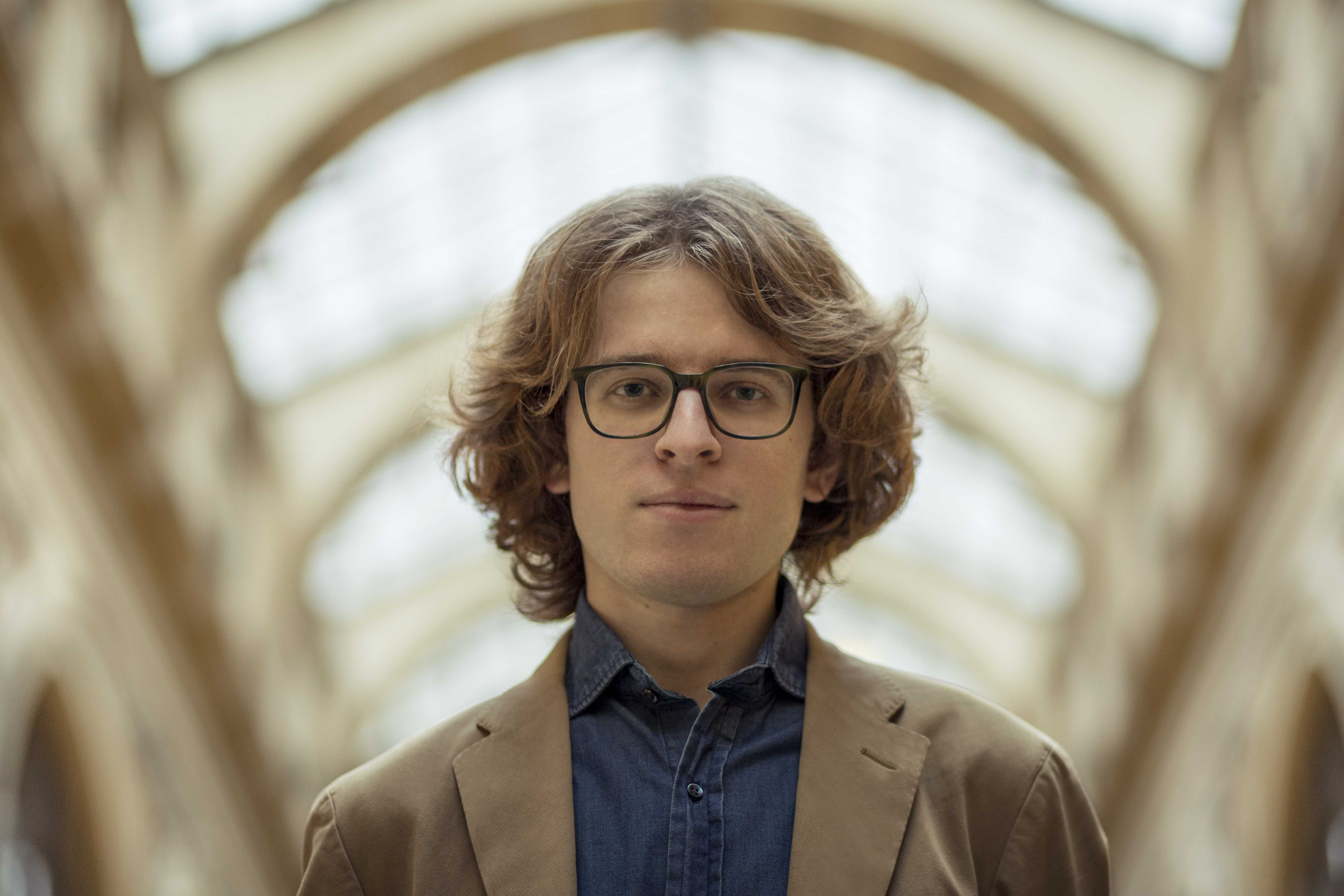 Portrait de Valentin Tournet à la Galerie Vivienne (Paris, France)